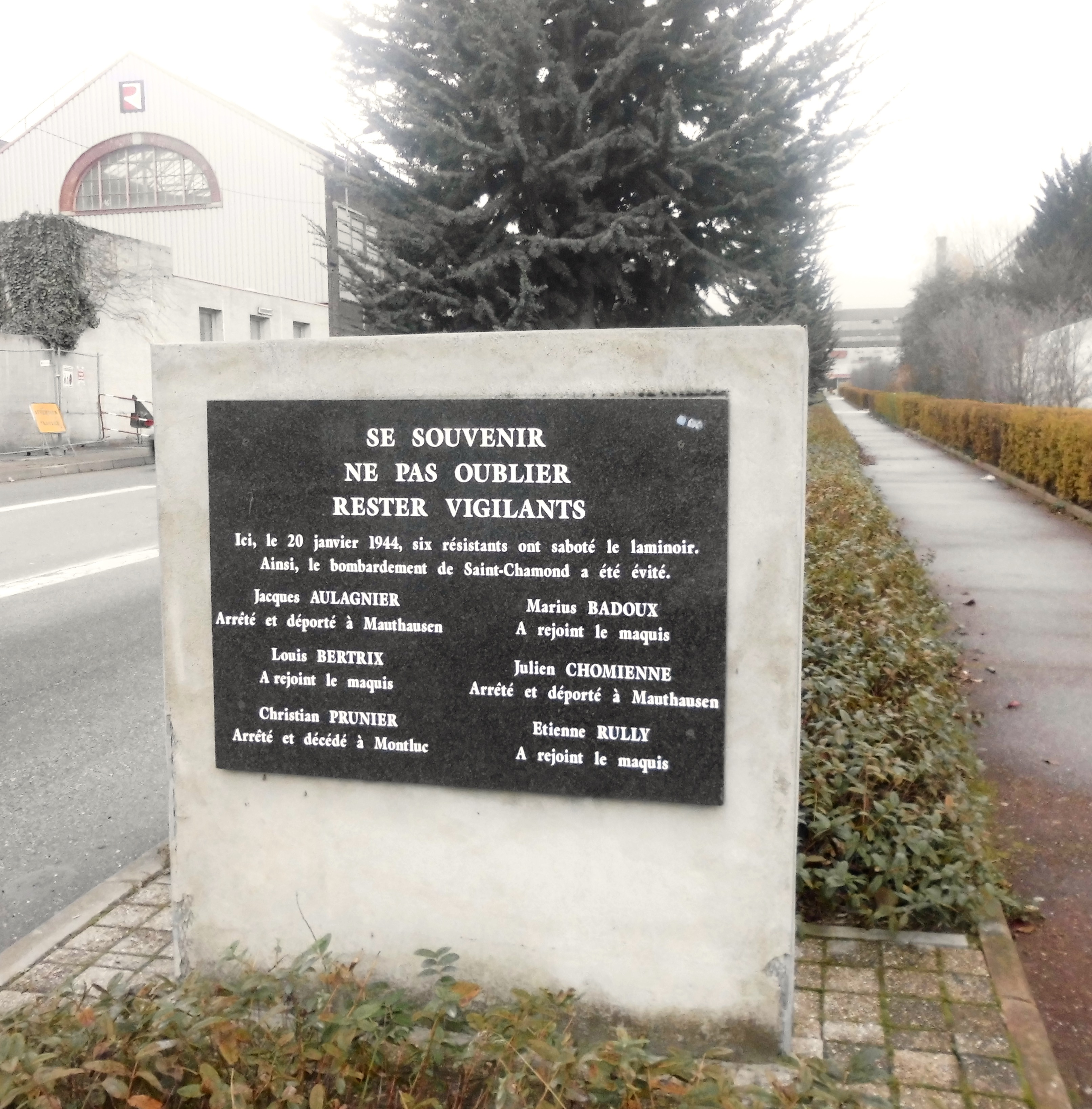 Saint-Chamond (Loire), rue Pétin-Gaudet, plaque commémorative du sabotage de janvier 1944.